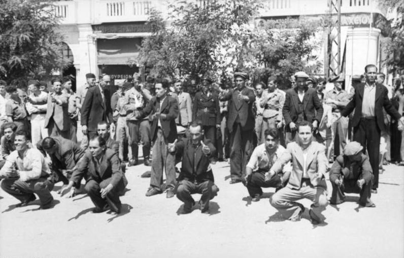 Scherl; Griechenland: In Übereinstimmung zwischen den deutschen und griechischen Stellen werden jetzt die Juden in Griechenland erfasst und einer nutzbringenden Arbeit zugeführt. Kriegsberichter Dick, Juli 1942